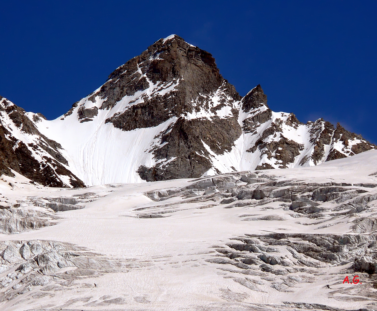 La Torre del Gran San Pietro dal ghiacciaio del Coupé di Moneye - Alpi Graie - Italy